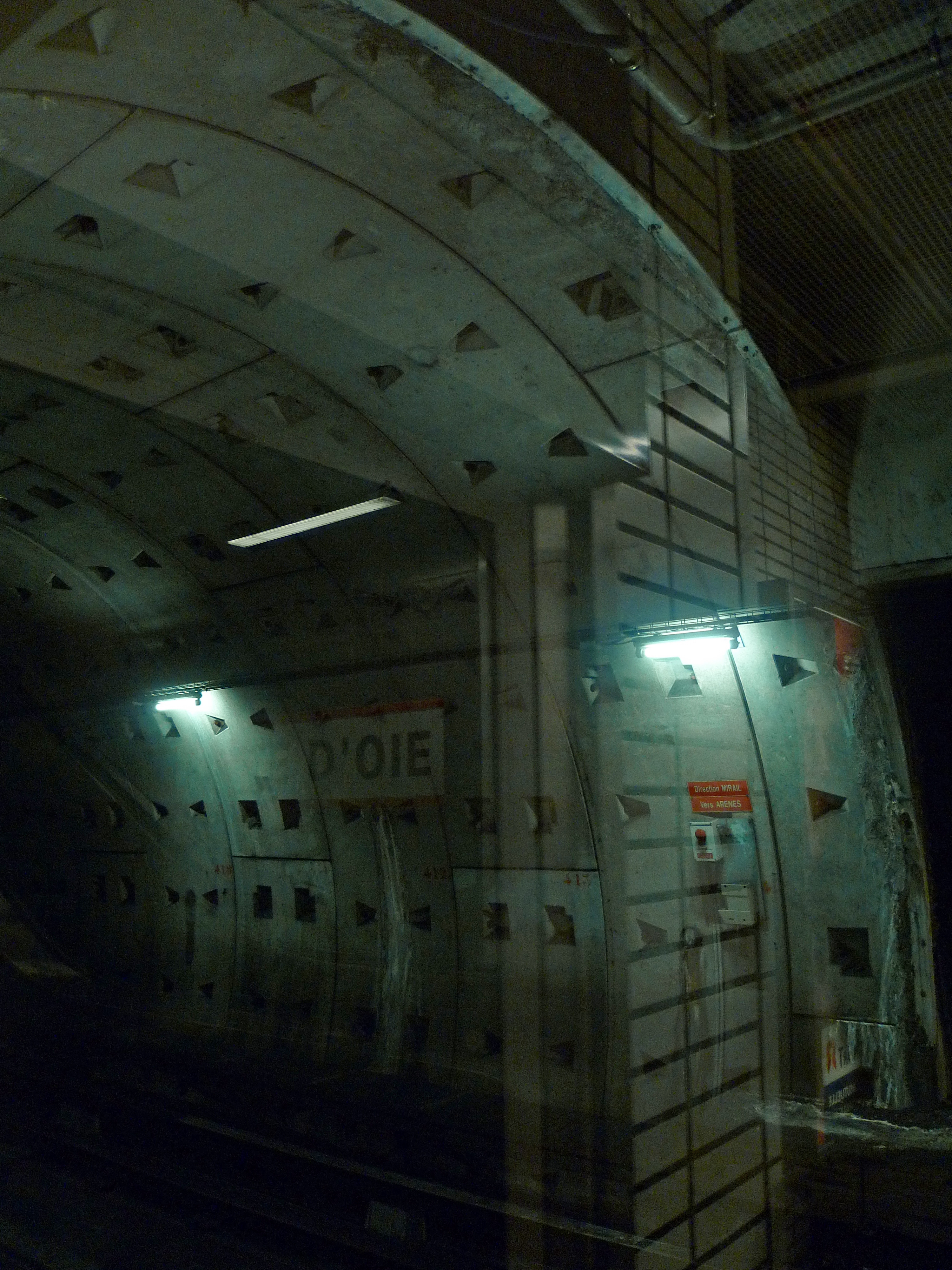 Toulouse (Haute-Garonne, Midi-Pyrénées, France) : Orée du tunnel à la station de métro Patte d'Oie.